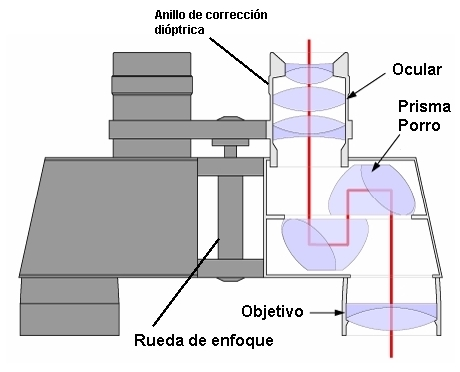 Origen de la imagen: [1]